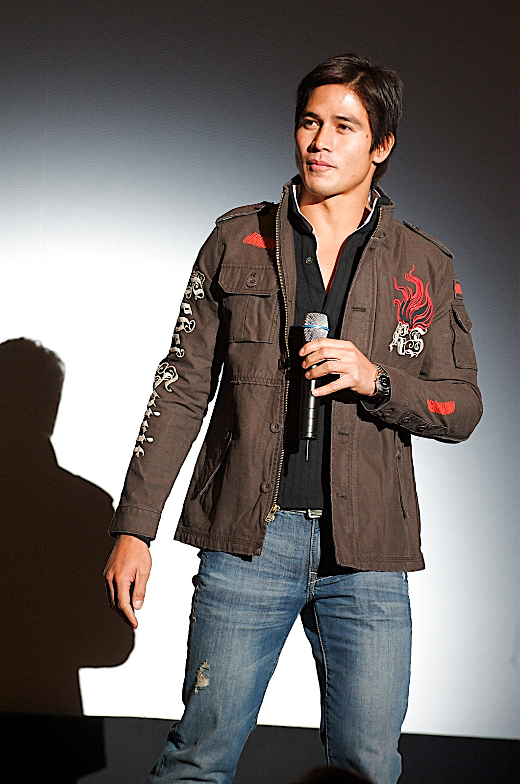 Piolo Pascual, Filipino actor